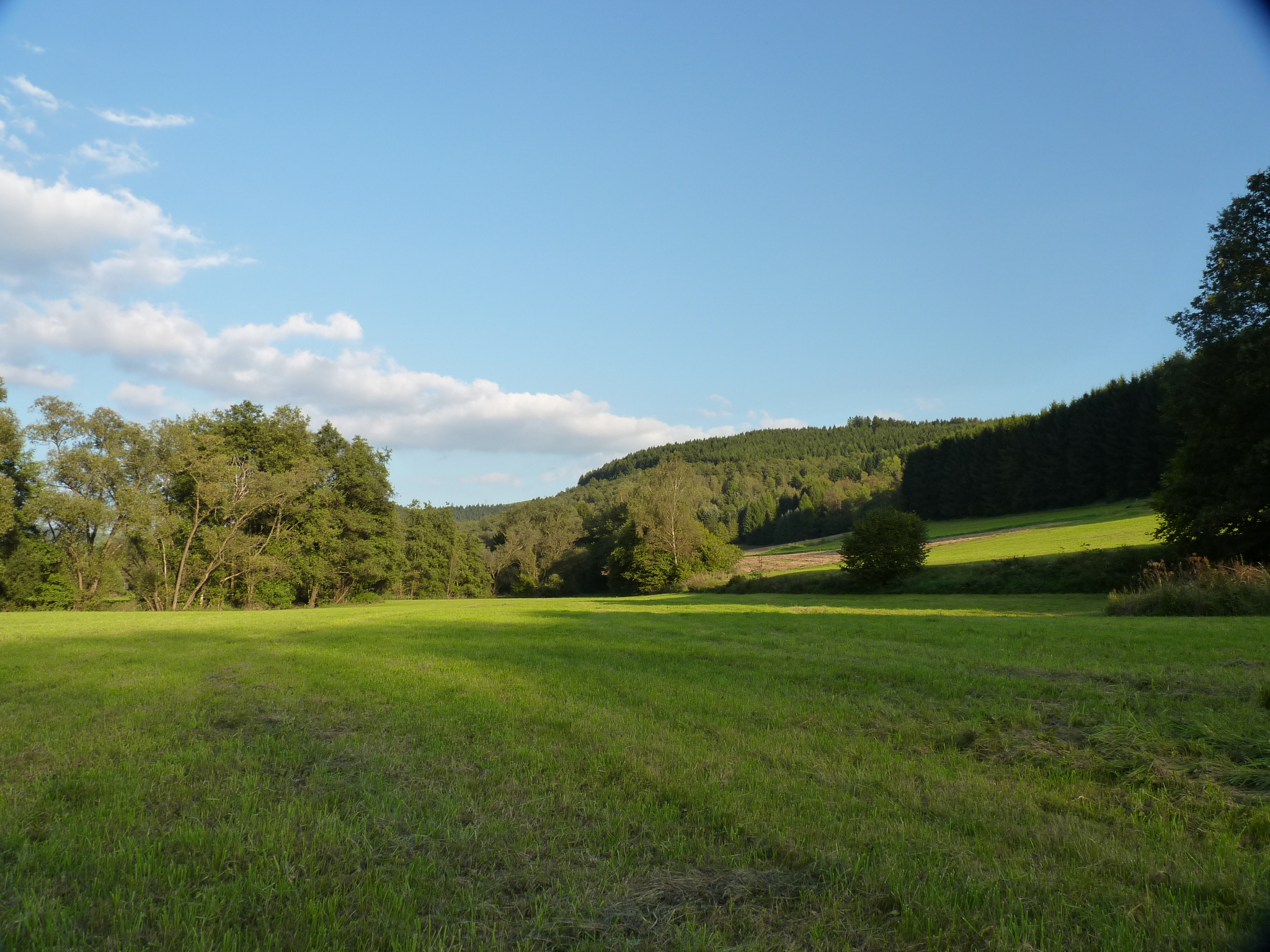 Siegtal bei Grissenbach im September 2014, im Hintergrund Berg Auf der Noll